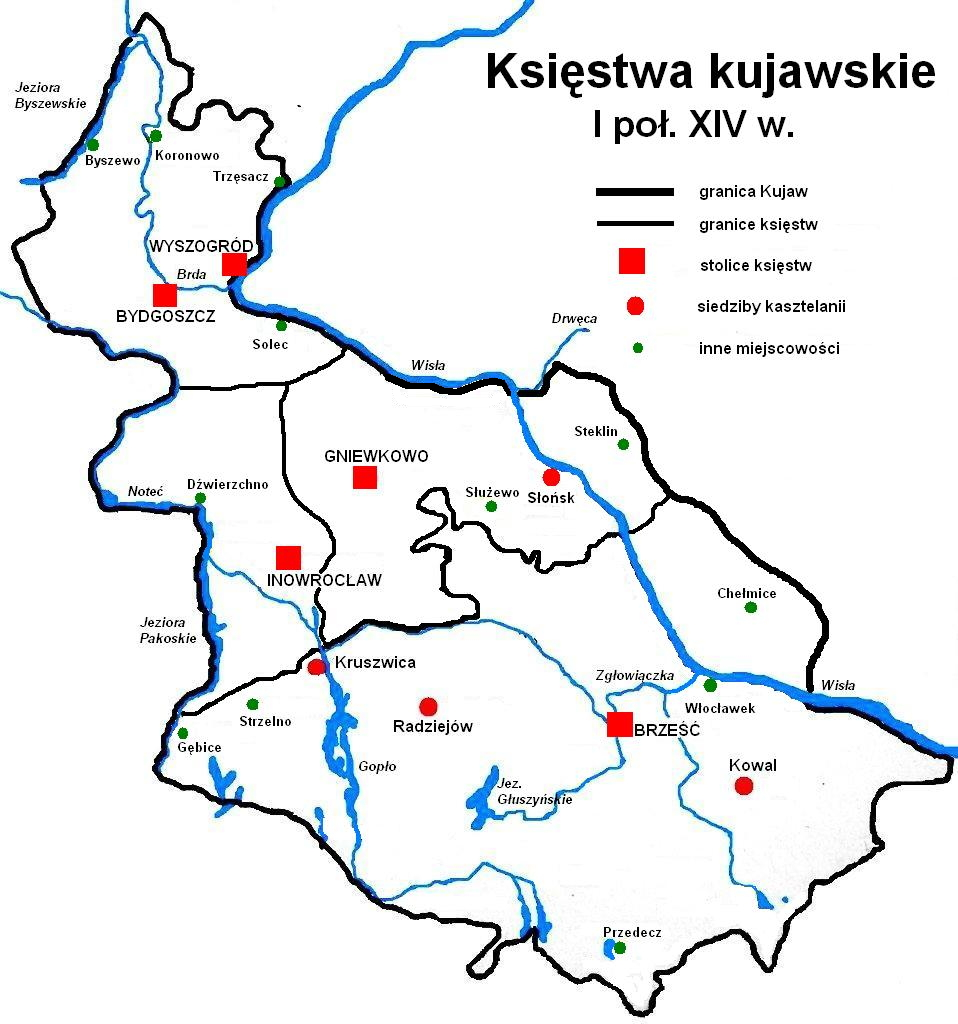 Kujawy - podział na księstwa w I połowie XIV wieku. Opracowano na podstawie: Guldon Zenon: Podziały administracyjne Kujaw i ziemi dobrzyńskiej w XIII-XIV wieku: Warszawa, Poznań : Państwowe Wydawnictwo Naukowe, 1974